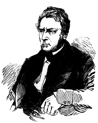 David Boswell Reid (1805–1863)